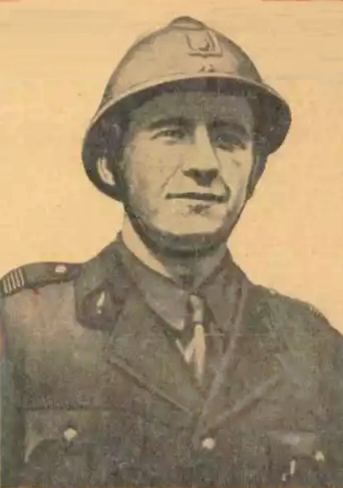 Portrait du "colonel Fabien" paru dans La Défense du 17 août 1945